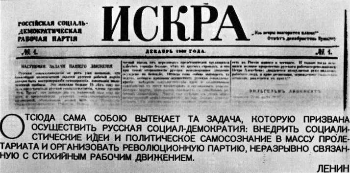 Bild von vor 1906